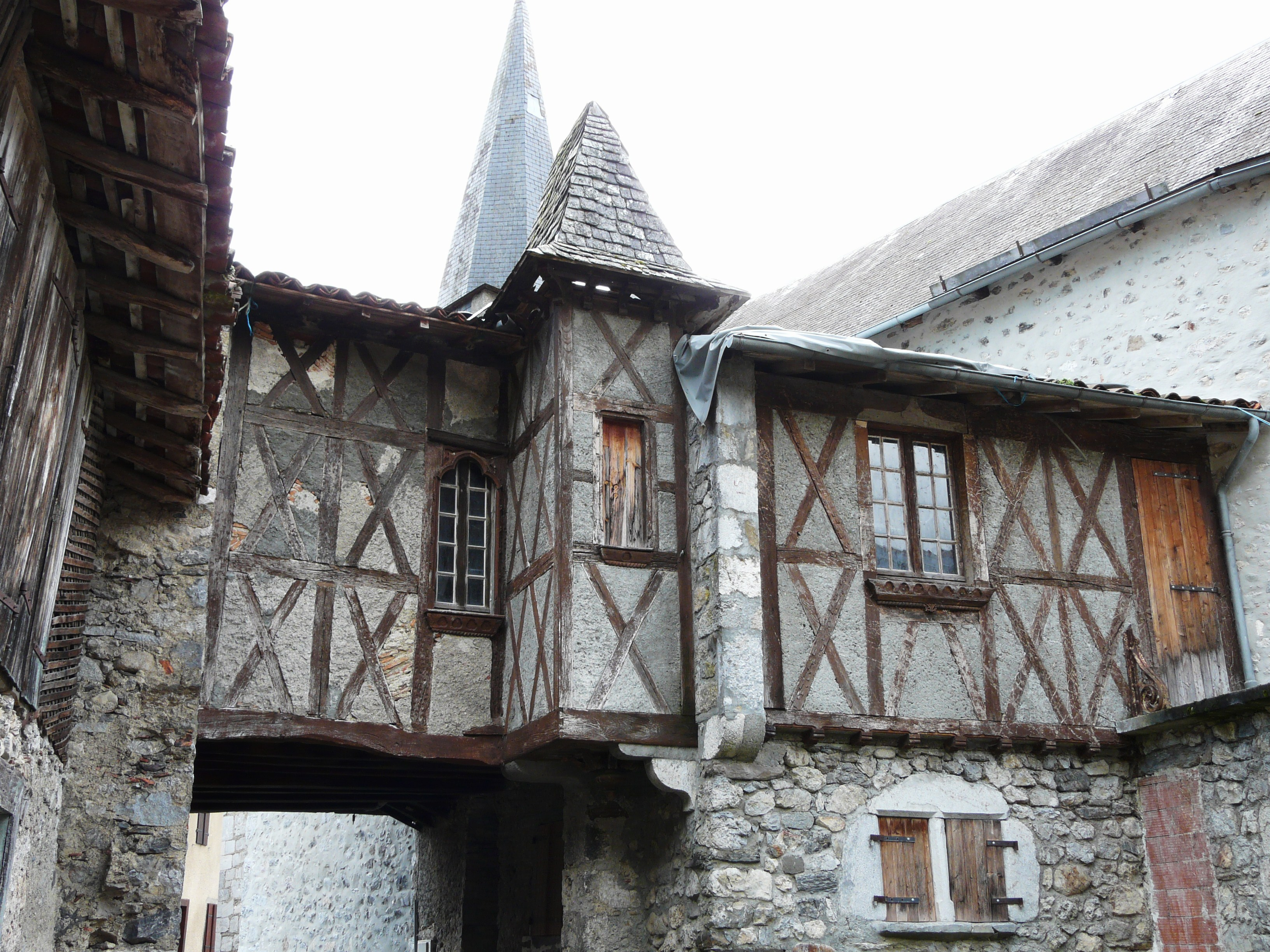 Maison à colombages dans le village de Mauléon-Barousse, Hautes-Pyrénées, France.